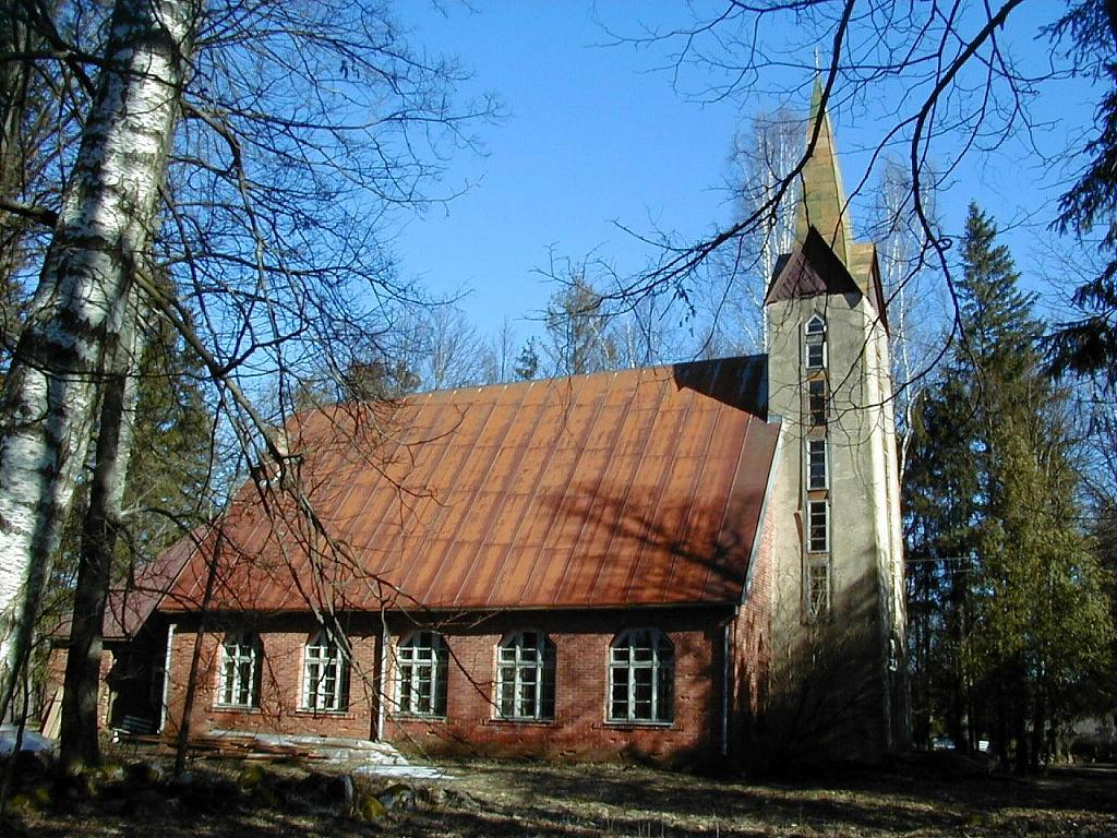 Pāles evaņģēliski luteriskā baznīca 2002-03-16